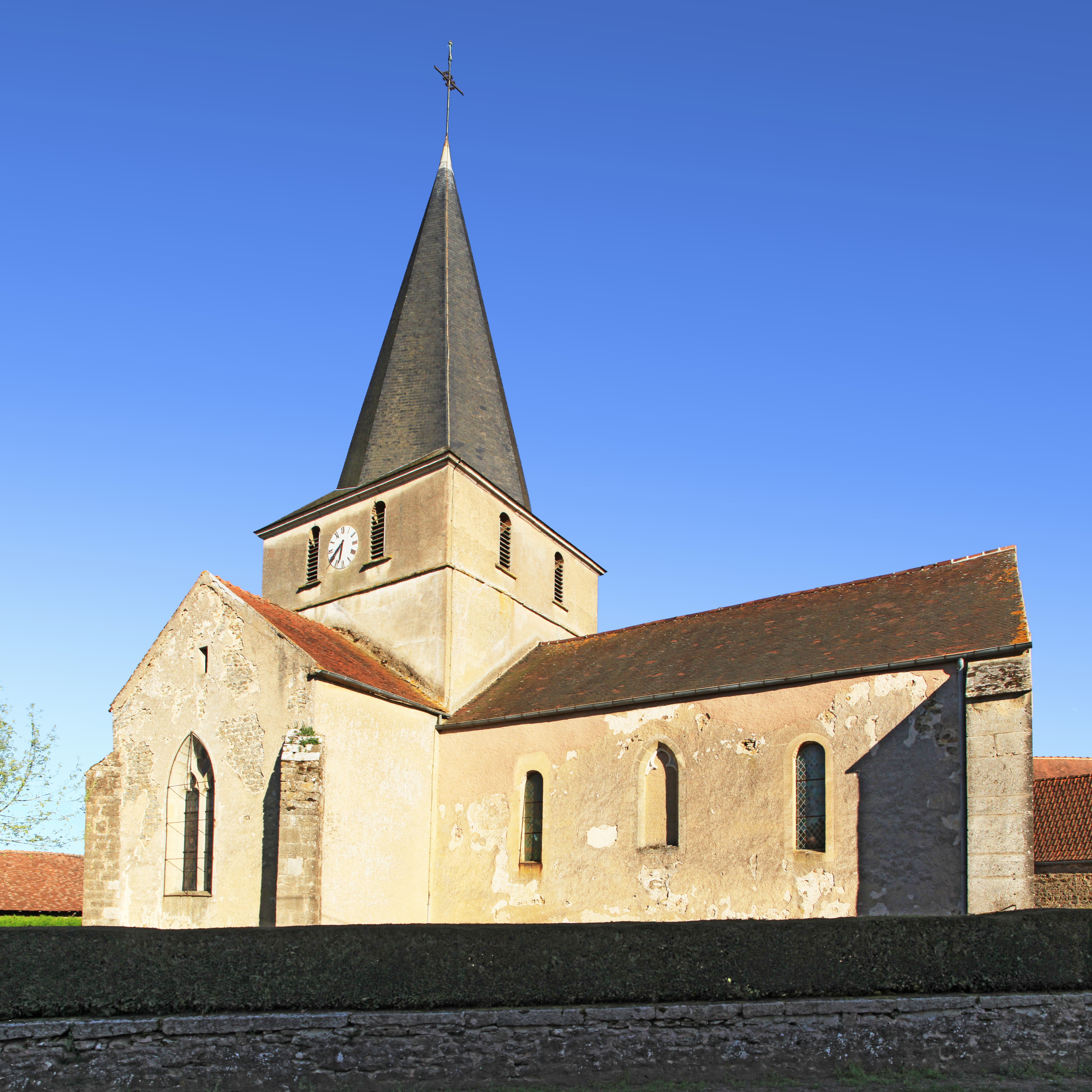 Église Saint-Pierre de Dompierre-en-Morvan